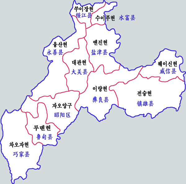 자오퉁시 현급구역도